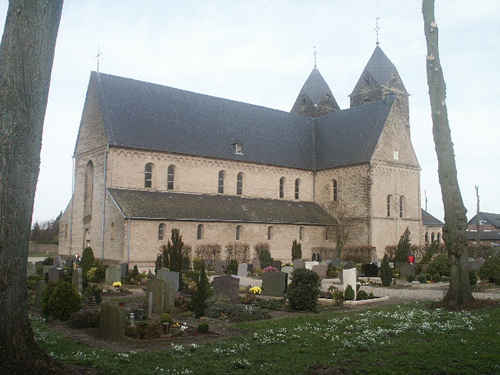 Kalkar-Wissel: St. Clemensstiftskirche